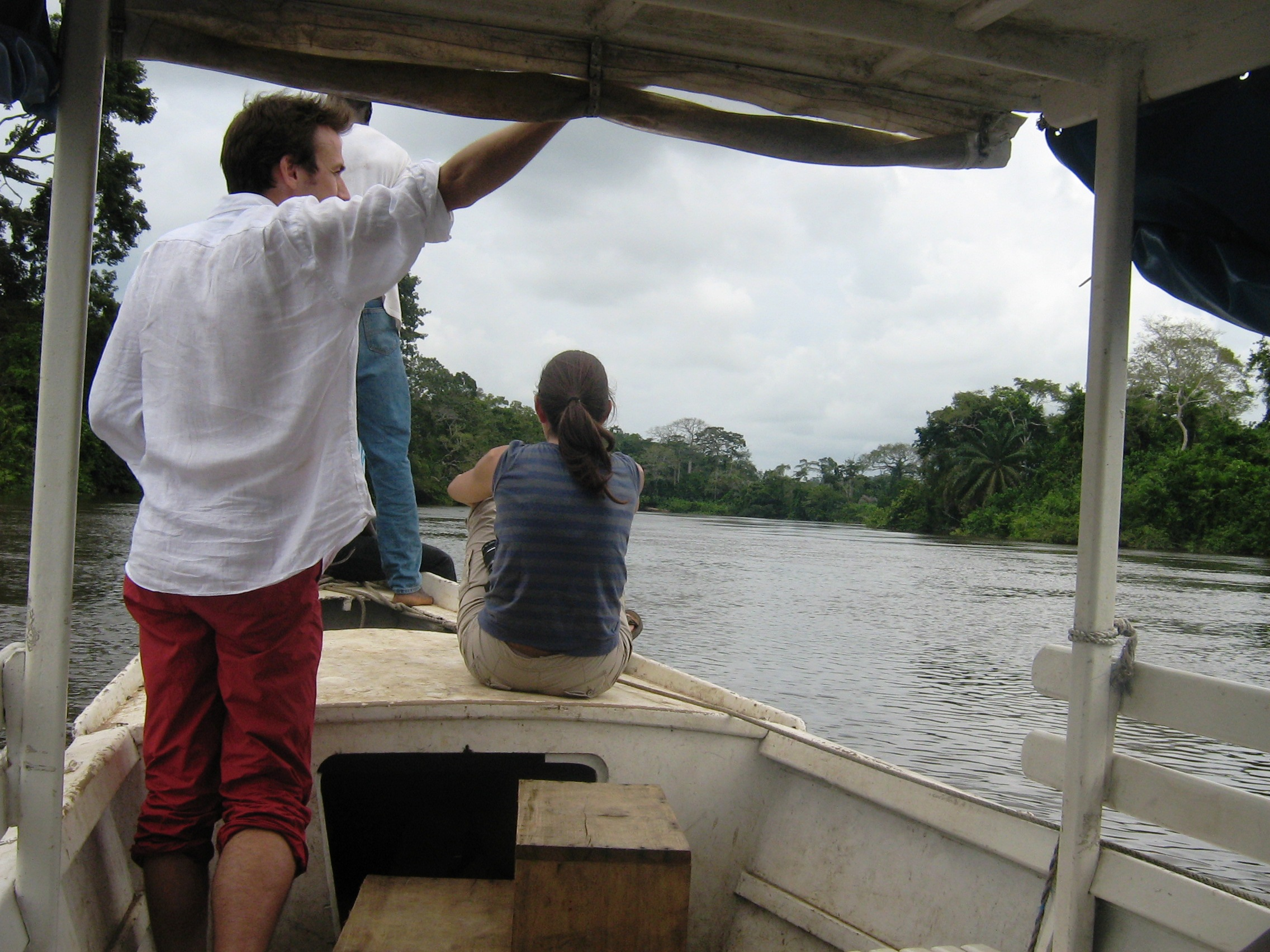 La Sasandro.